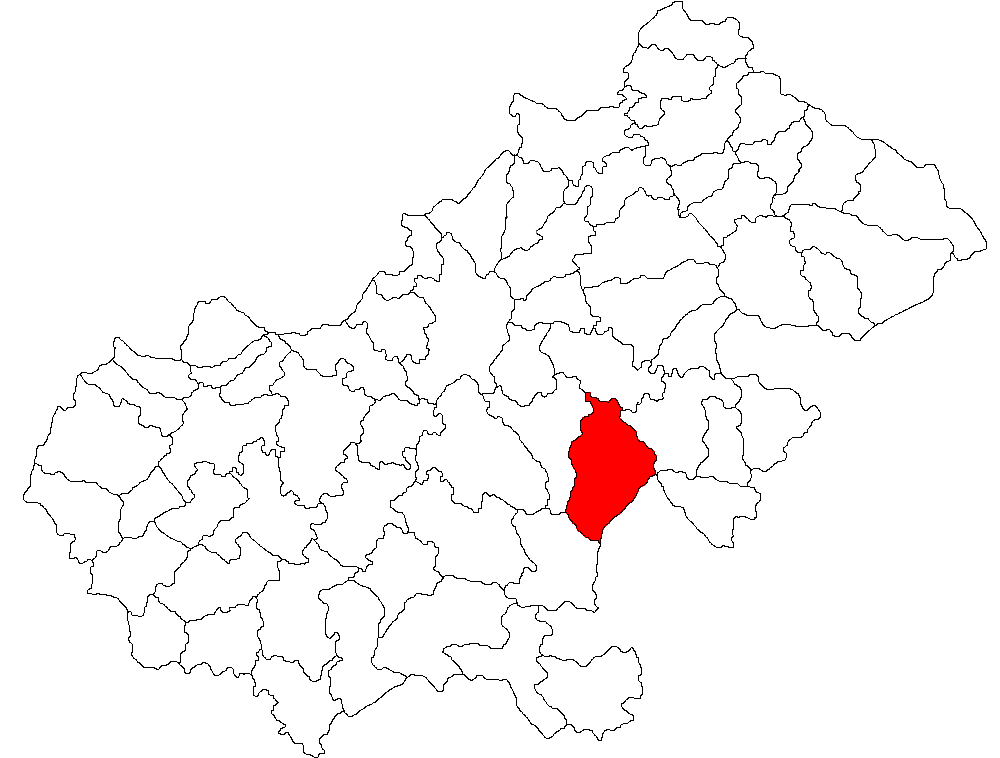 Categorie:Hărţi ale judeţului Satu Mare